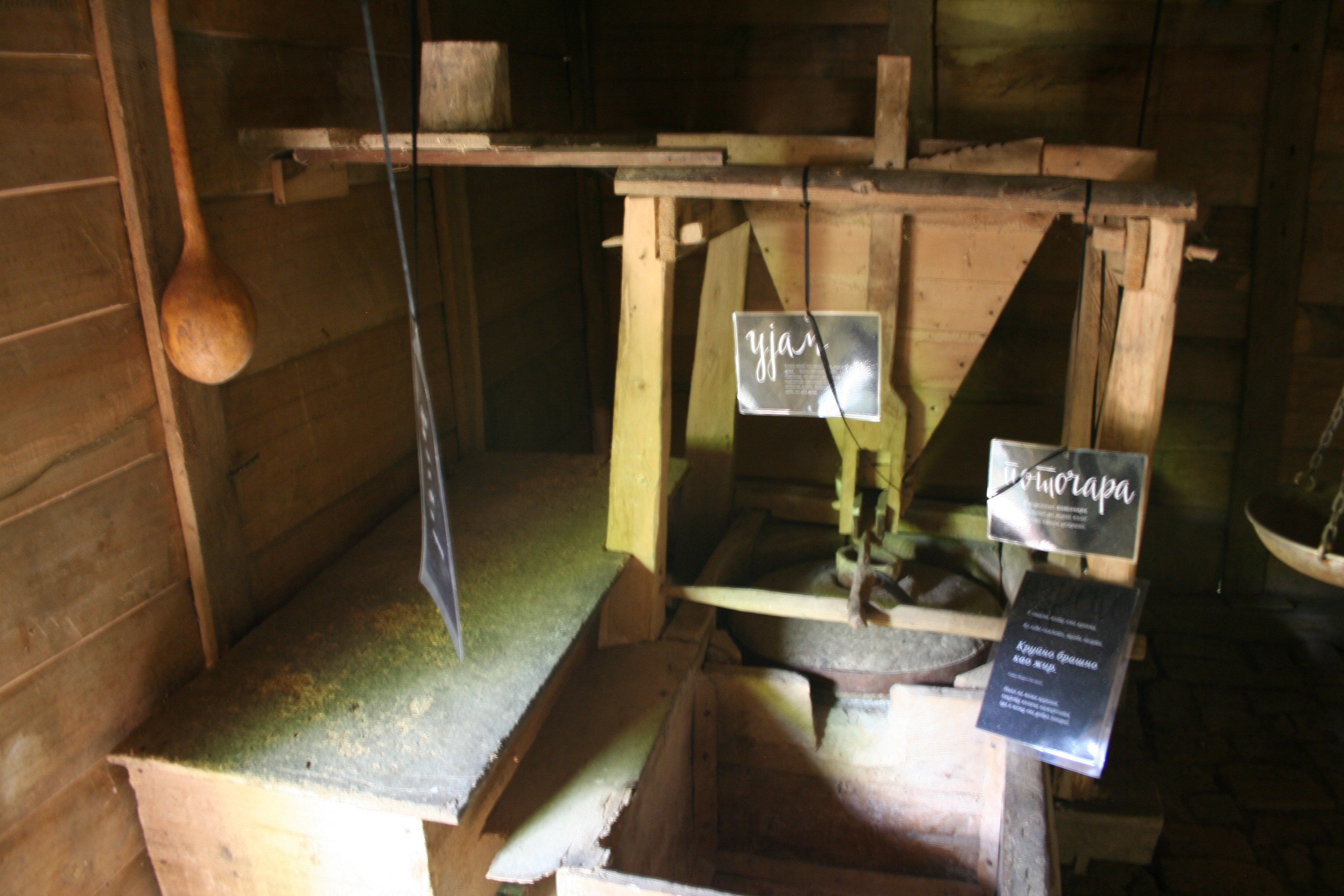 Spomen-kompleks Vuk Stefanović Karadžić, Tršić